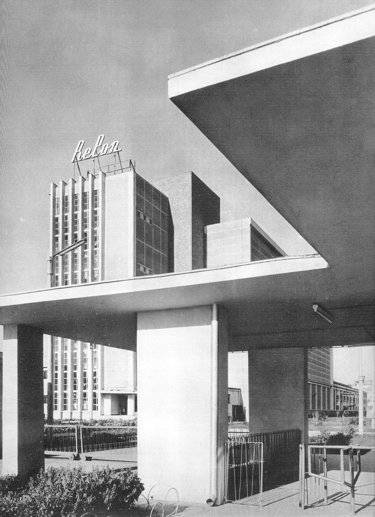 Vedere exterioară a Combinatului de fire și fibre sintetice Relon Săvinești.